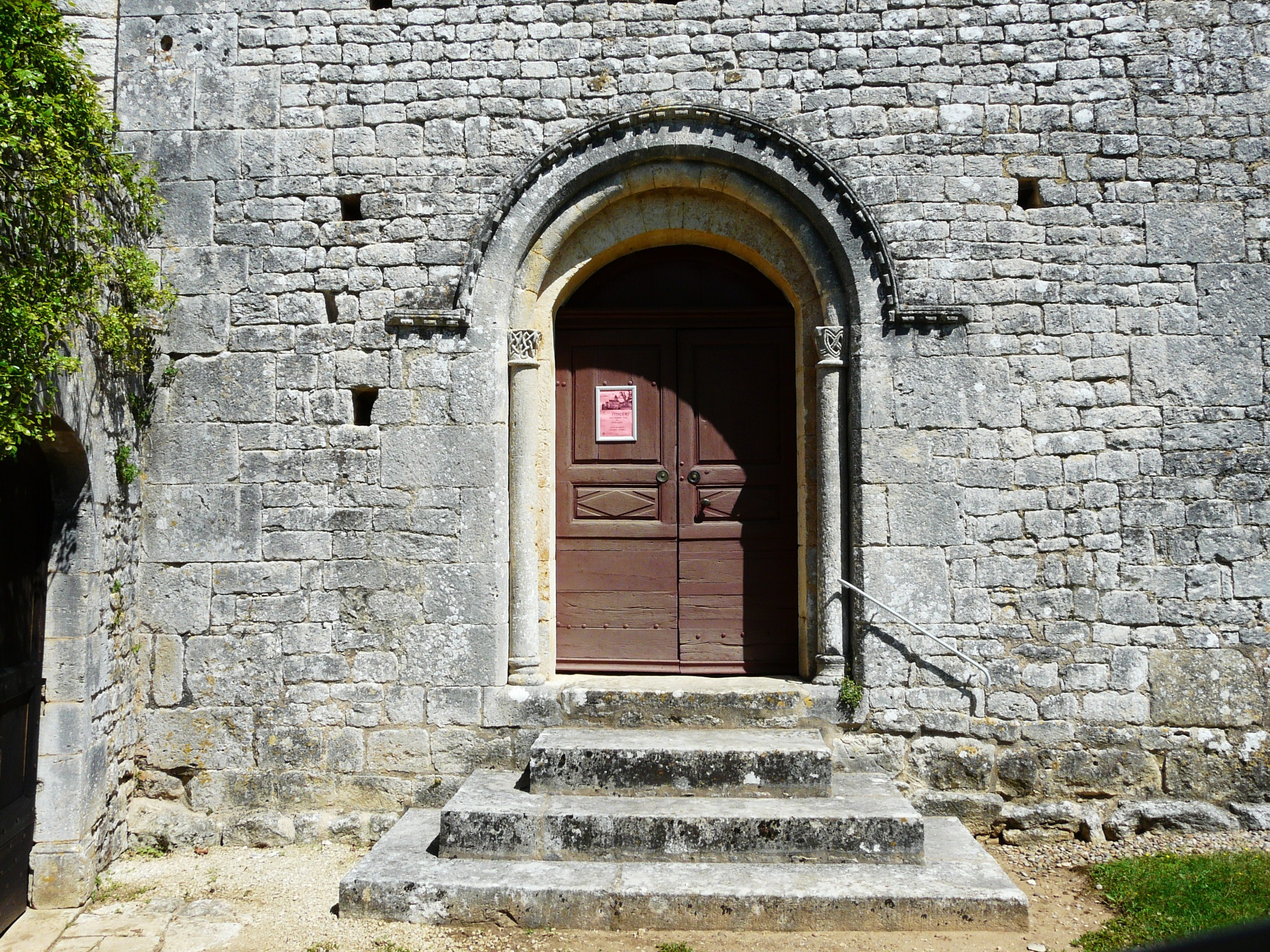 Le portail de l'église Saint-Barthélemy, La Cassagne, Dordogne, France